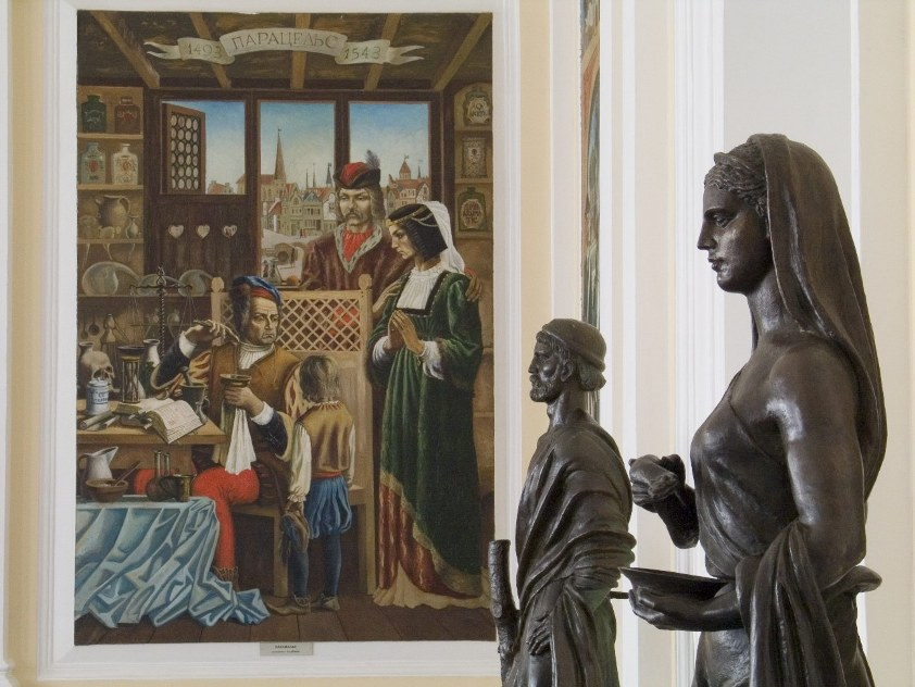 Хол Національного музею медицини України